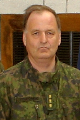 Kenraaliluutnantti Seppo Toivonen